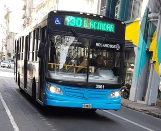 Mercedes-Benz carrozado por La Favorita, interno 3561 de la línea 130 de Rosario Bus. Barrio Acindar es uno de los destinos.